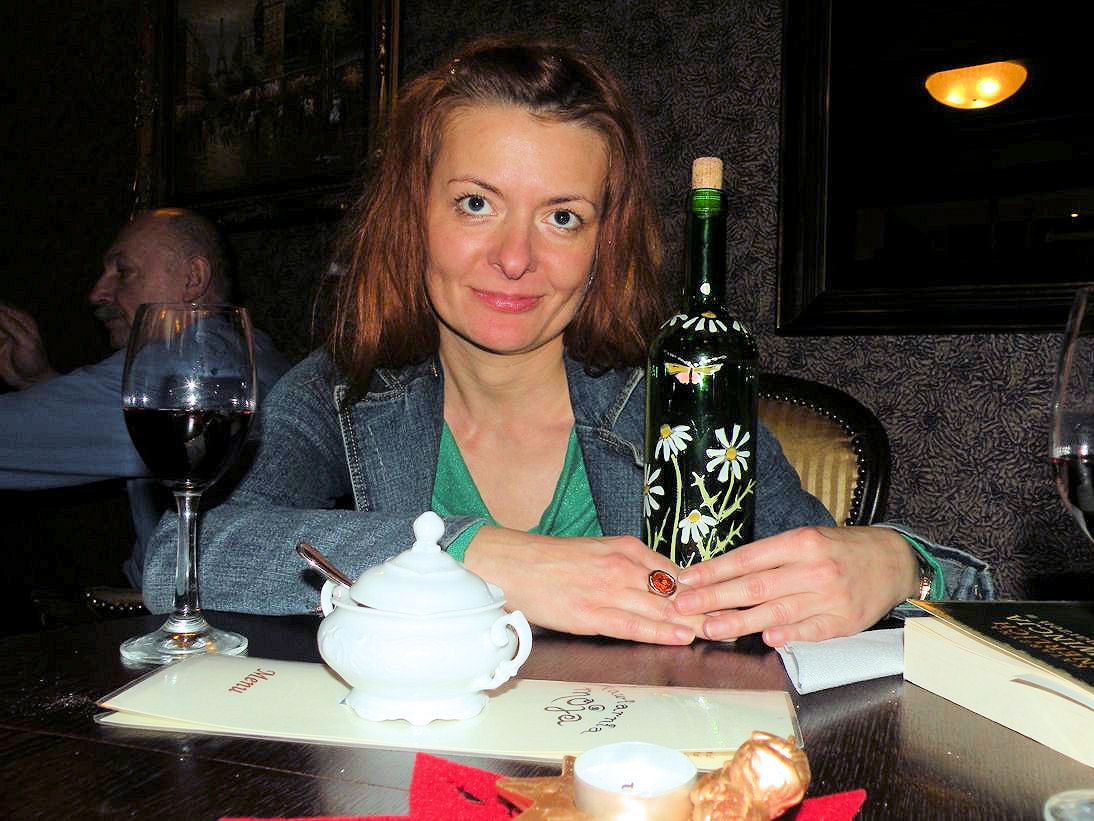 Katarzyna Enerlich na spotkaniu autorskim w Kawiarni Moja (Olsztyn), spotkanie w olsztyńskiej kawiarni naukowej Collegium Copernicanum, styczeń 2012 r.